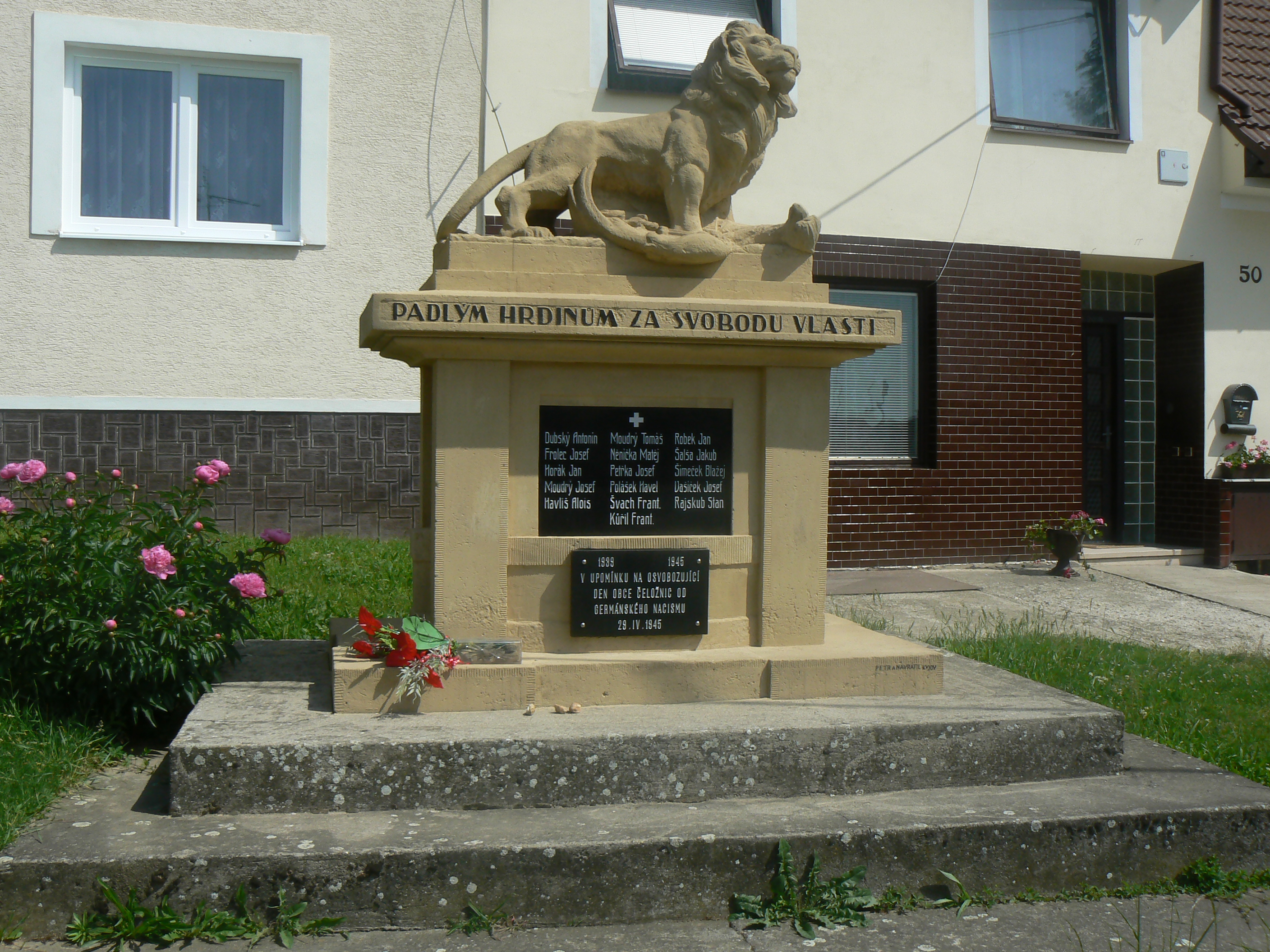 Pomník padlým v Čeložnicích.